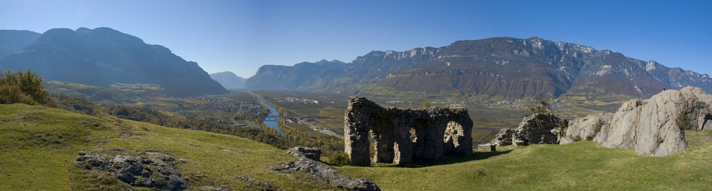 Castelfeder mit Blick auf die Etsch und dem Weindorf Tramin